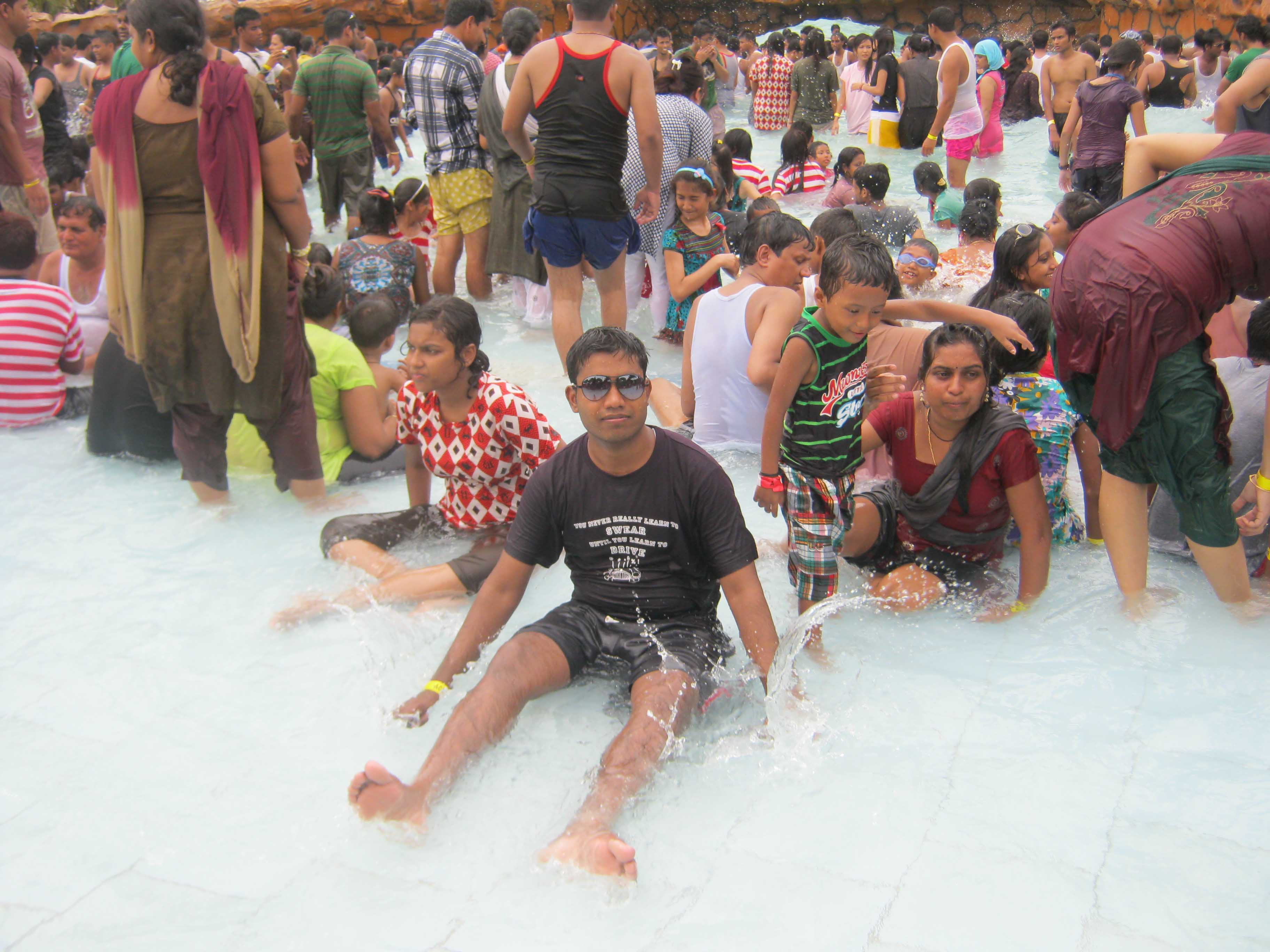 guwahati accoland